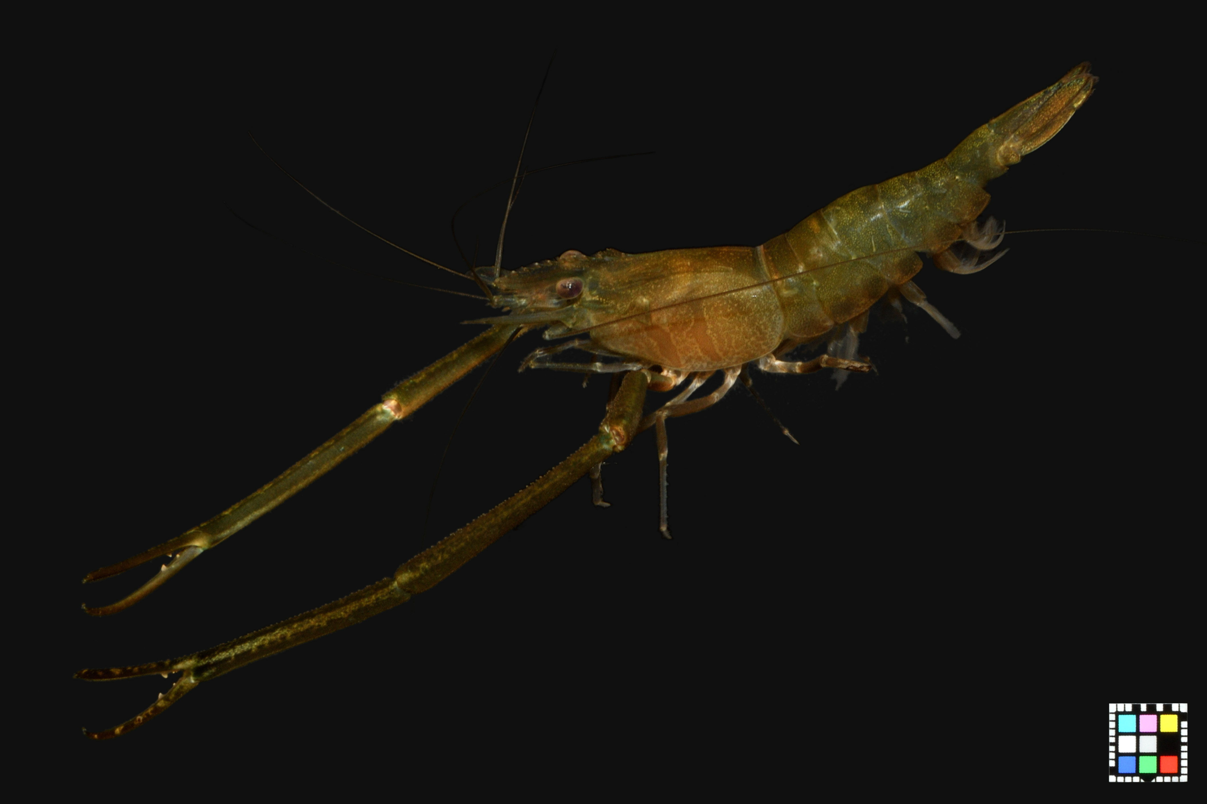 ミナミテナガエビのオス、福岡県。 詳細